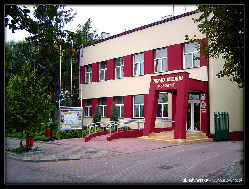 Budynek Urzędu Miejskiego w Głownie - siedziba przy ul. Młynarskiej